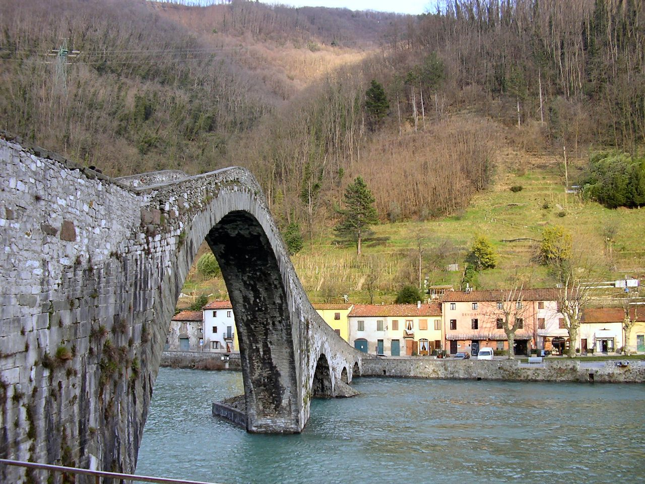 Borgo a Mozzano, Toscana, Italia